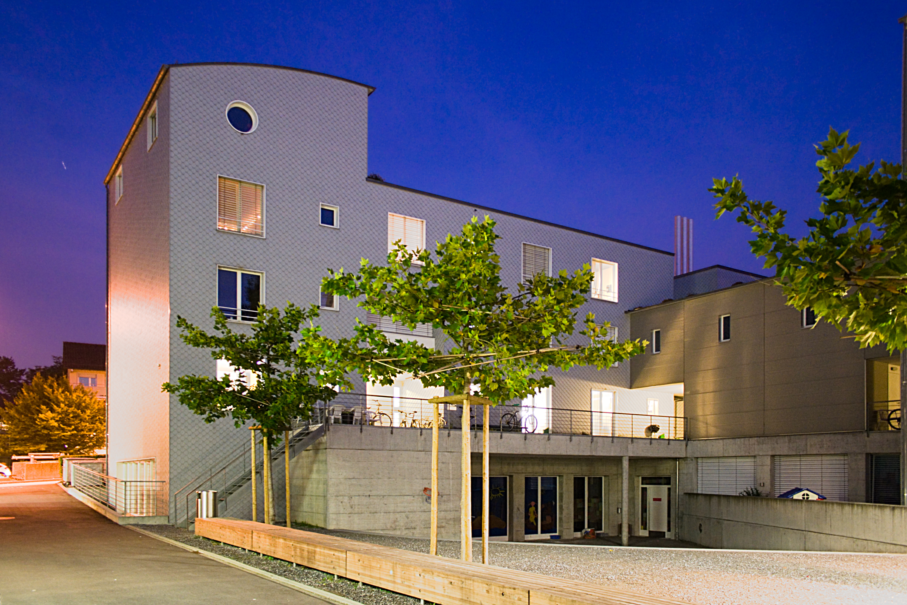 Studentensiedlung Netzwerk in Zürich, auch Siedlung Bülachstrasse genannt Entworfen von den Architekten Gret Loewensberg und Alfred Pfister